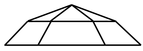 Схематическое изображение огранки розой